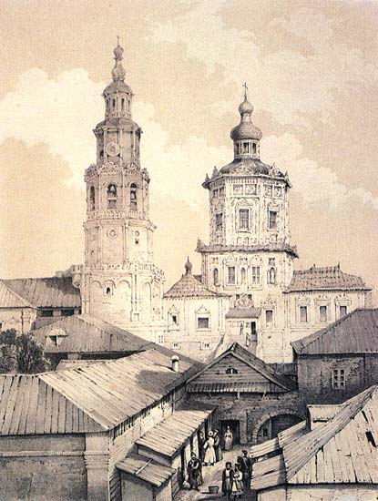 Петропавловский собор. Из альбома: Виды Казани, рисованные с натуры Эдвардом Турнерелли. — Лондон, 1839.